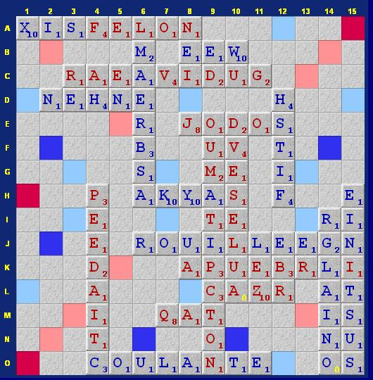 Ma propre image.